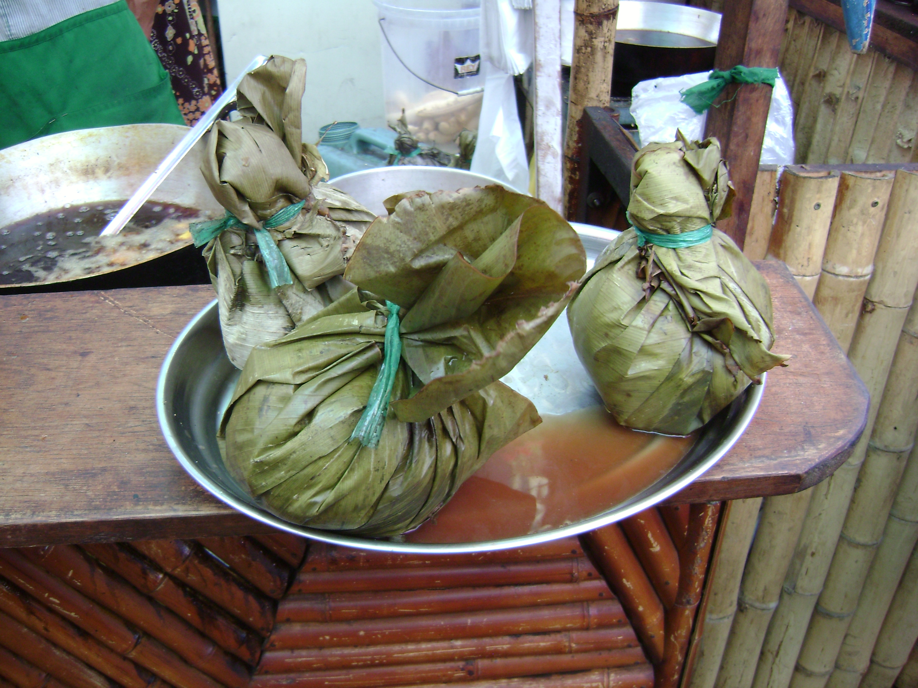 Juanes.